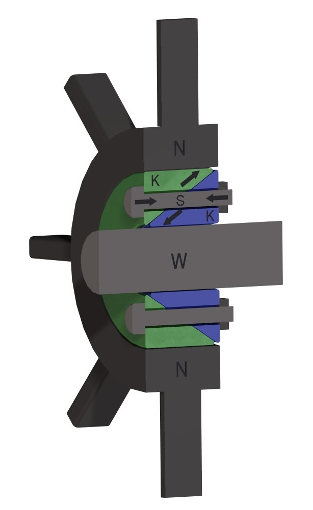 Schema eines Spannsatzes (clamping set)